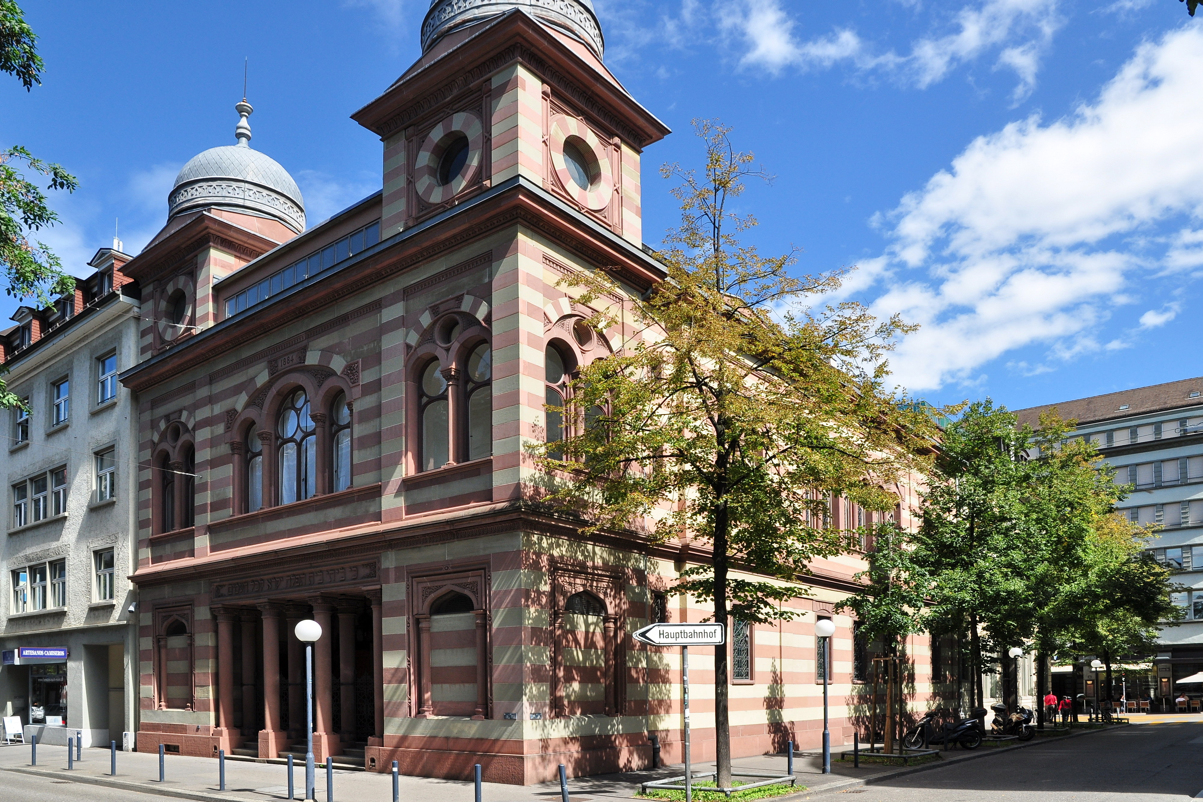 Synagoge der Israelischen Cultusgemeinde, Löwenstrasse in Zürich-City (Switzerland)